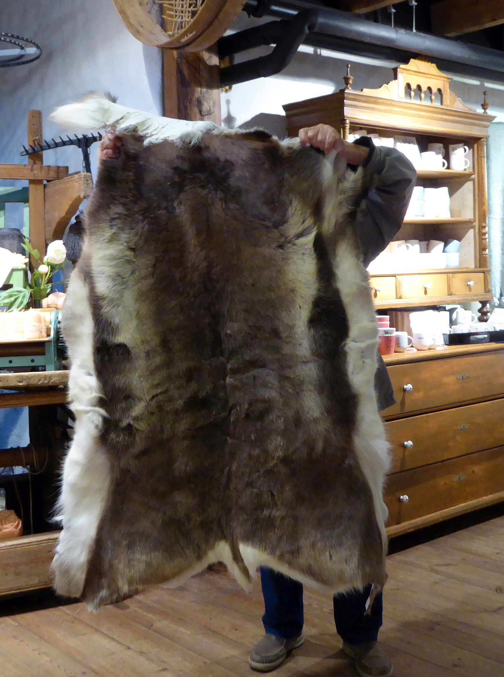 Byrkjedalstunet Byrkjedal, Norway .